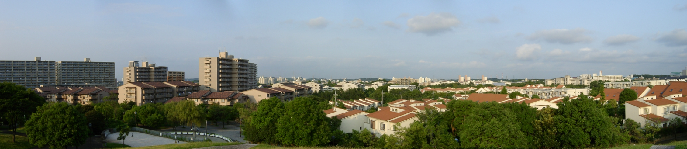 鶴牧東公園の通称『はげ山』から多摩ニュータウンを撮影。数枚の画像を合成してパノラマ画像にしてある。